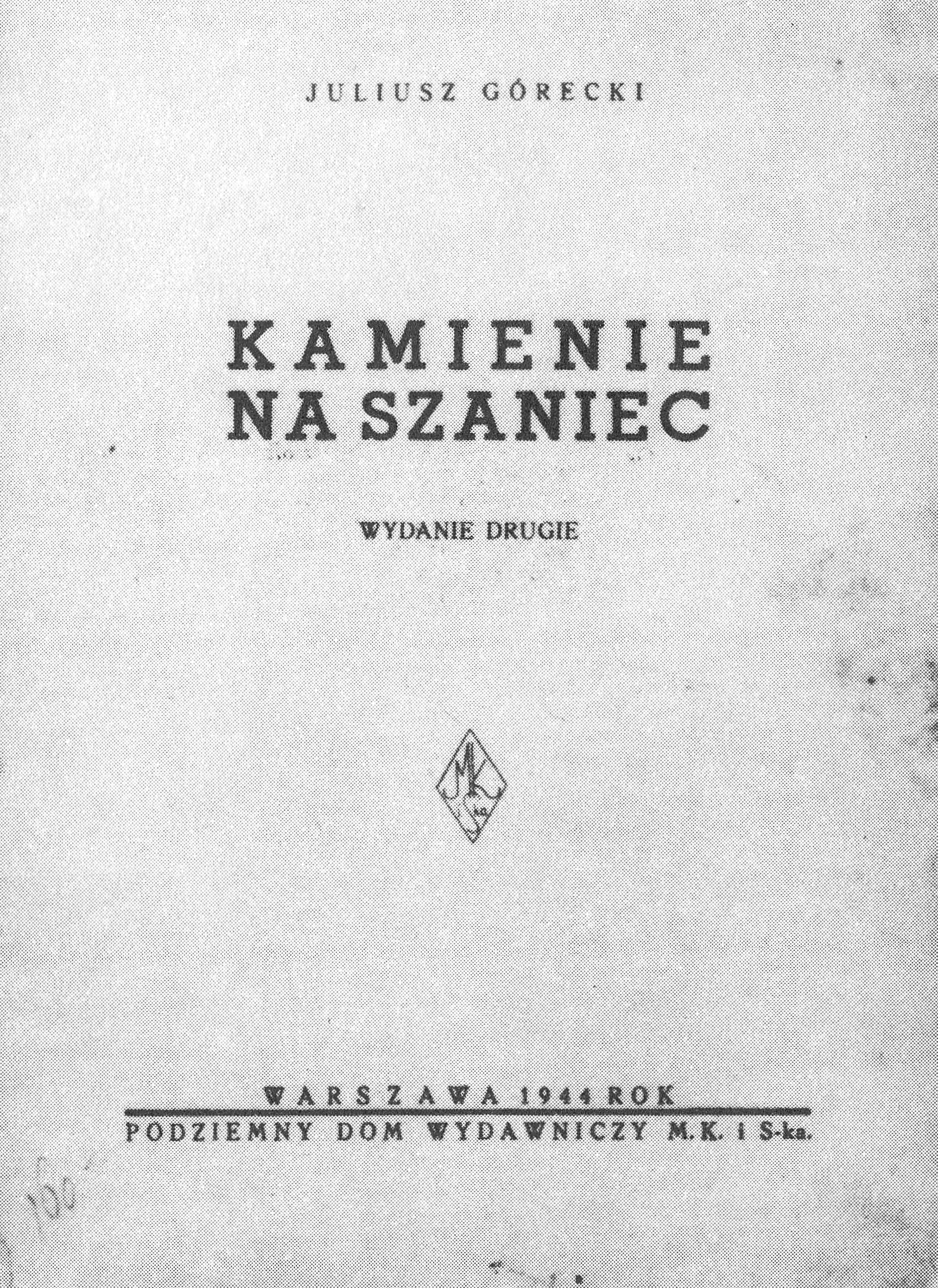 Strona tytułowa II wydania Kamieni na szaniec Aleksandra Kamińskiego